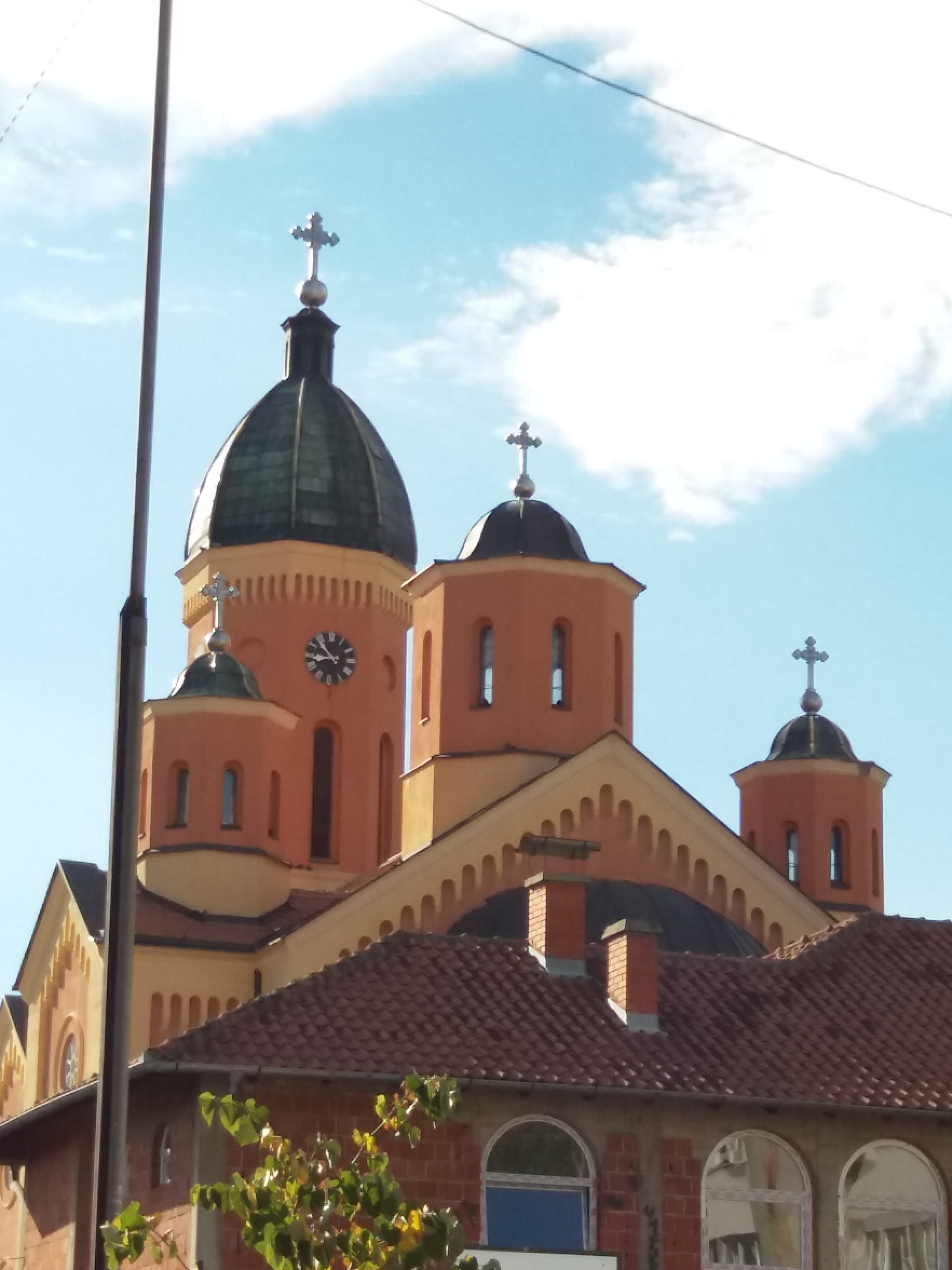 Srpski (latinica): Crkva Svetog Preobraženja, Smederevska Palanka